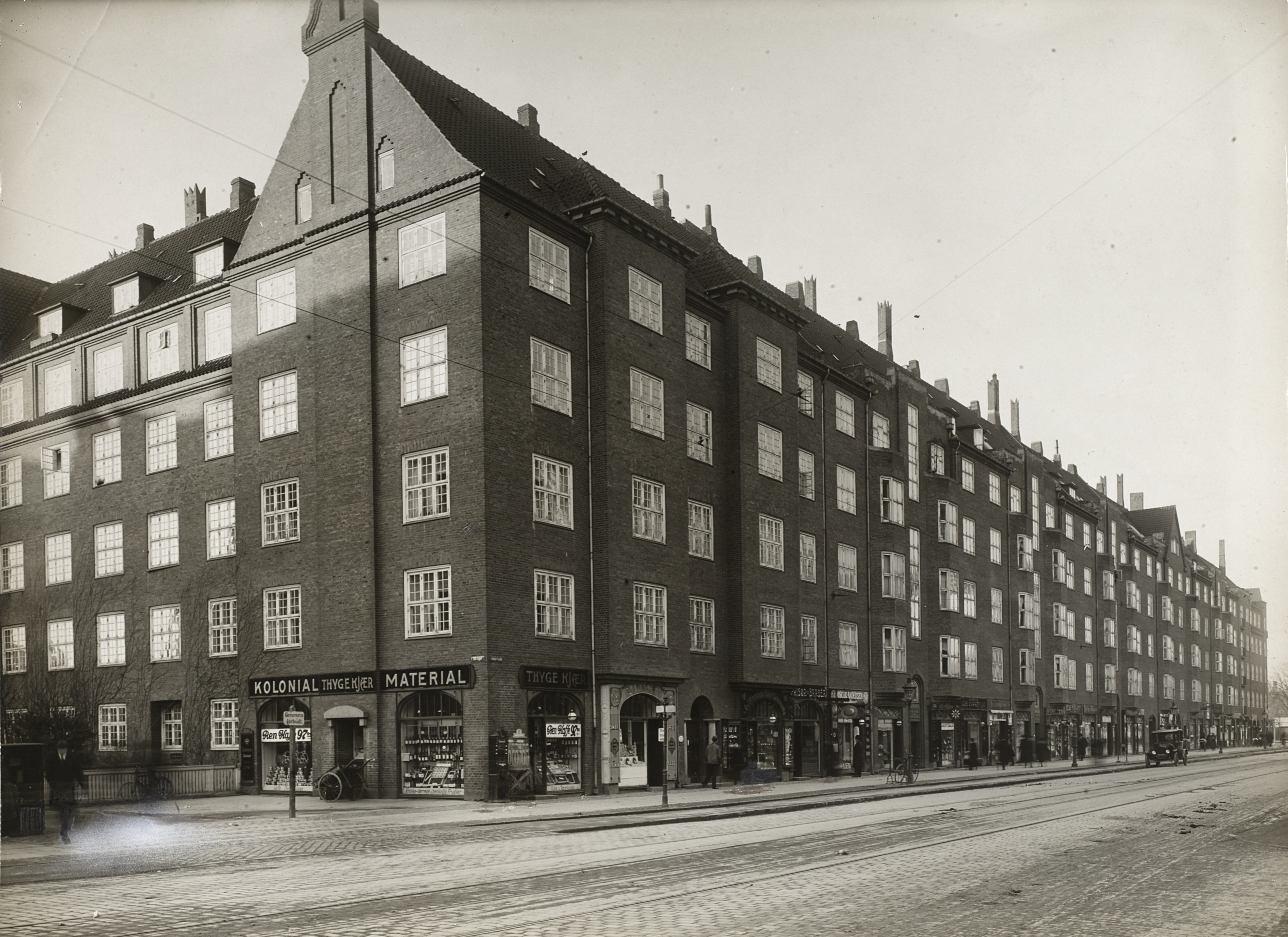 Beboelseskarréen Haabet, Amagerbrogade 4-16, Ved Amagerport, Svinget, Ved Linden, Amagerbro, København, opført 1912-1913, tegnet af arkitekterne Valdemar Dan og Charles I. Schou, præmieret af Københavns Kommune 1914. I dag administreret som Andelsboligforeningen Haabet med 166 lejligheder og 28 erhvervslejemål.[1]